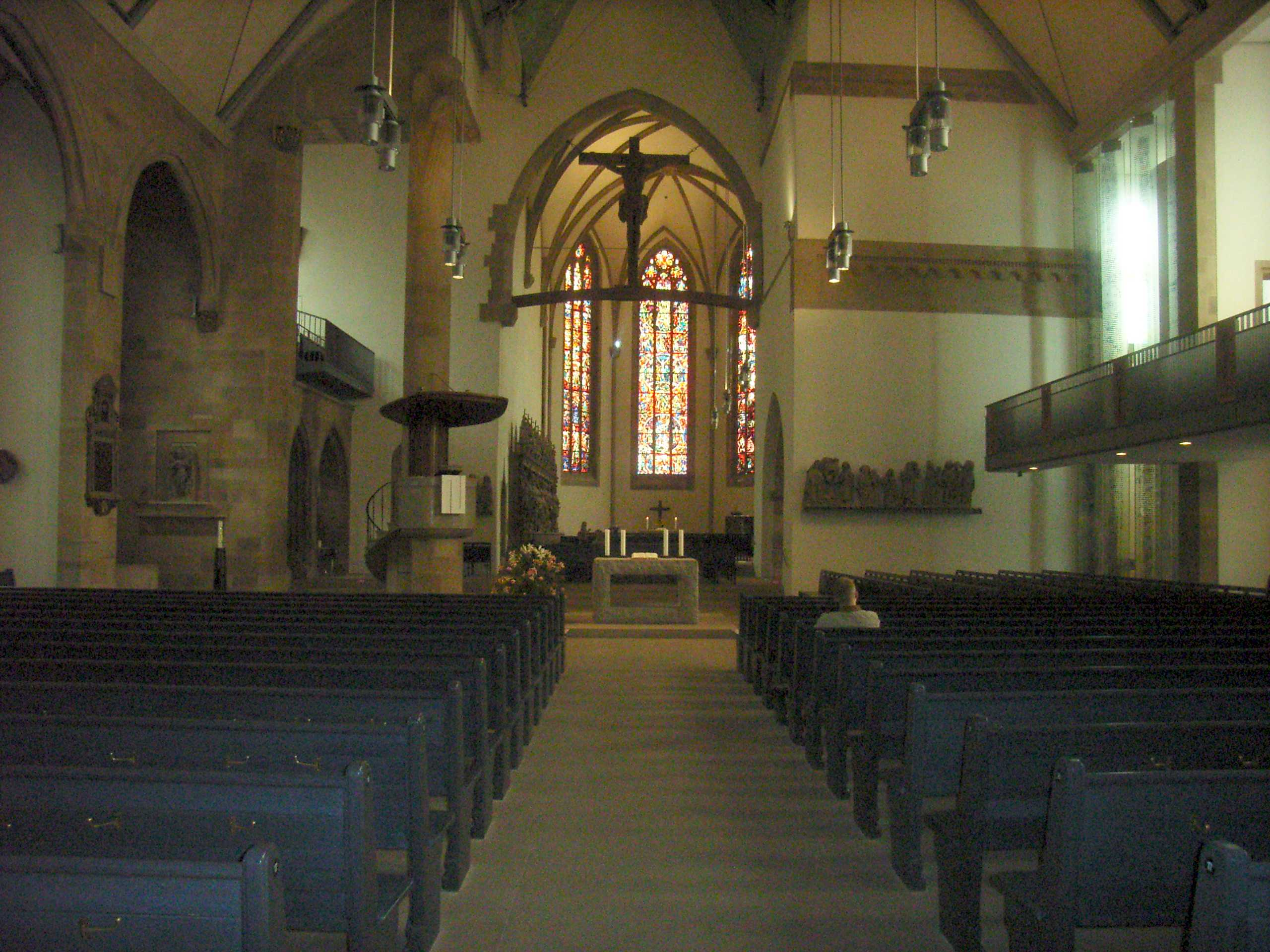 Stuttgart, Stiftskirche, Innenansicht nach Osten